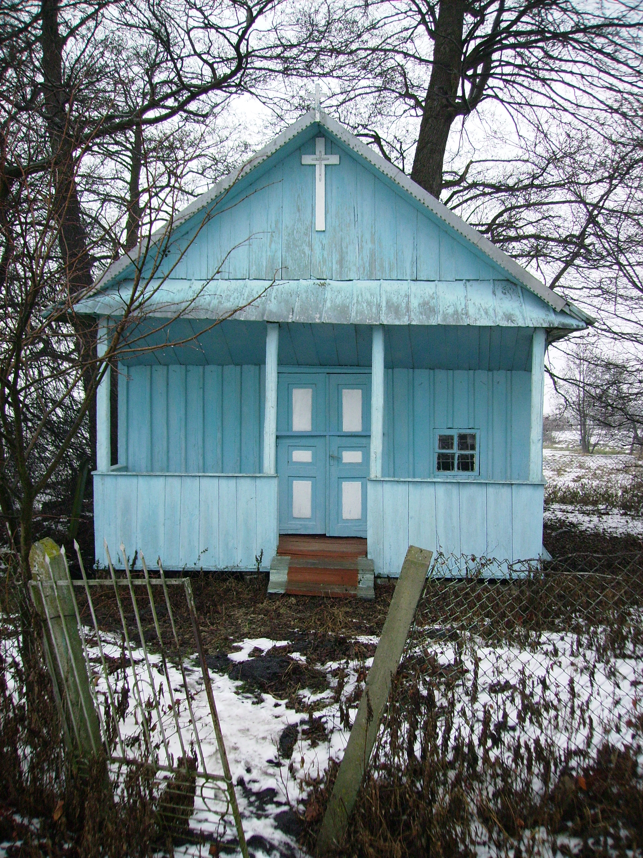 Капличка св. Іоанна в с. Одринки, Сарненського р-ну, Рівненської обл., існування якої складає більше 300 років.